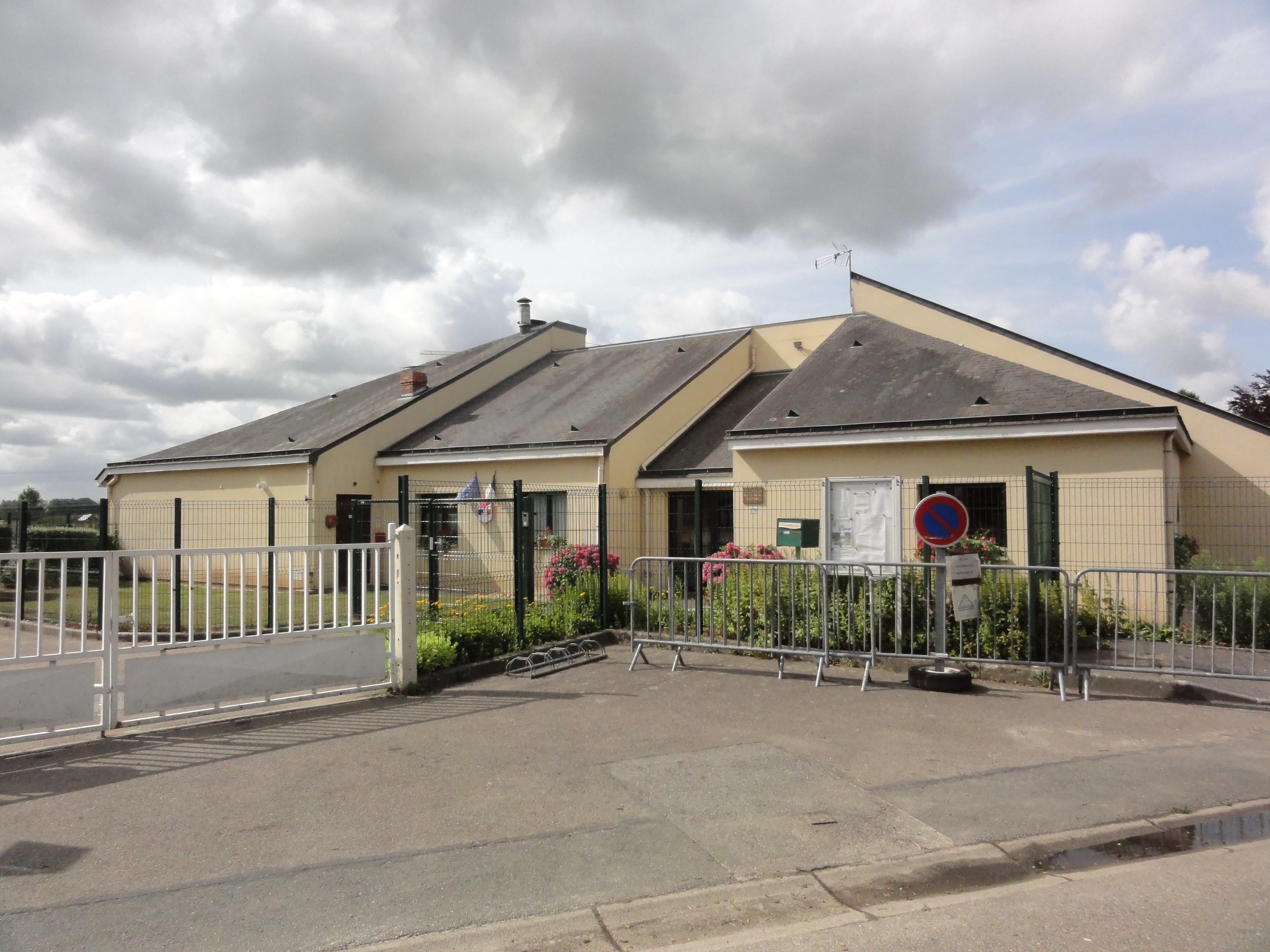 Touffreville-la-Corbeline (Seine-Mar.) école